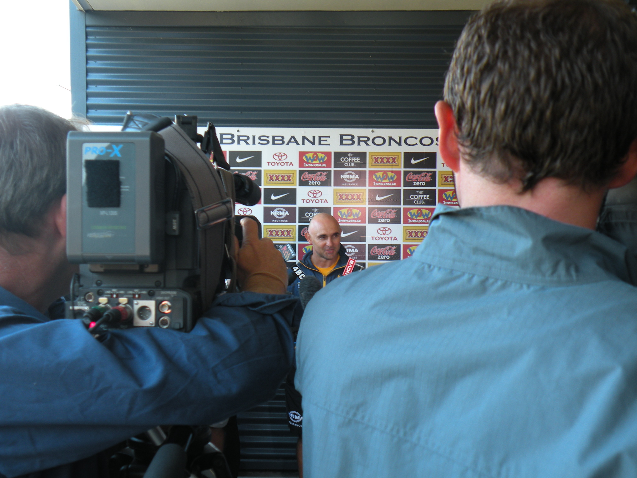 Ivan Henjak en interview en 2009 en tant qu'entraîneur des Brisbane Broncos.